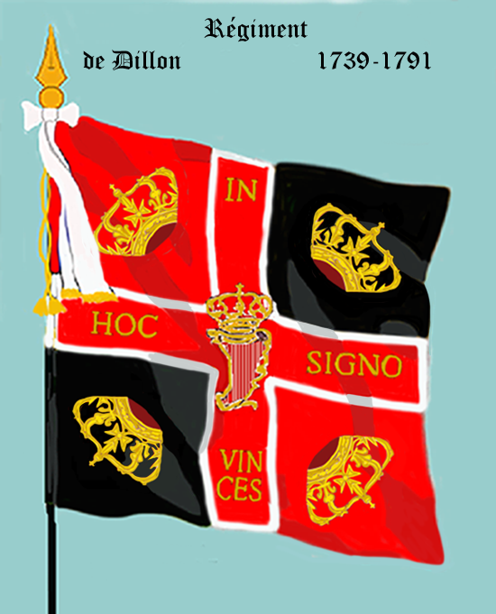 Ordonnanzfahne eines Fremdenregiments im königlich französischen Dienst. - Entnommen und überarbeitet aus: „LES UNIFORMES ET LES DRAPEAUX DE L'ARMÉE DU ROI“ Marseille 1899. (Drapeau d'Ordonnance d' un régiment etranger au service française.)